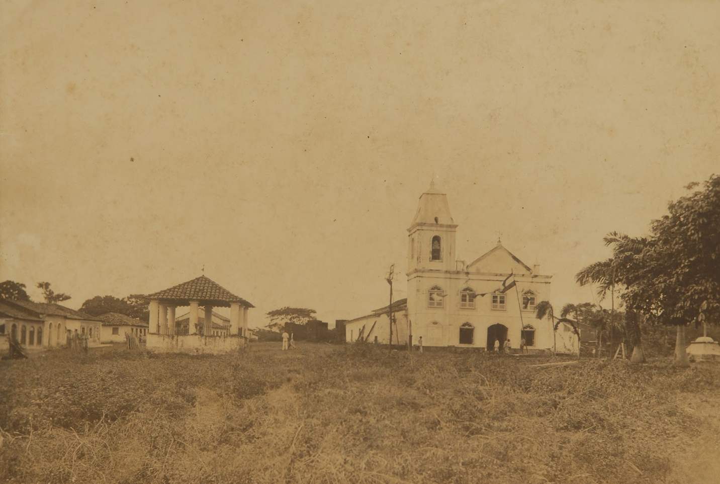 'Arraial de São José do Riba-Mar em 1908'